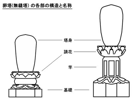 無縫塔の各部の名称 作者作成 参考文献：川勝 政太郎 『日本石造美術辞典』 東京堂出版 1998